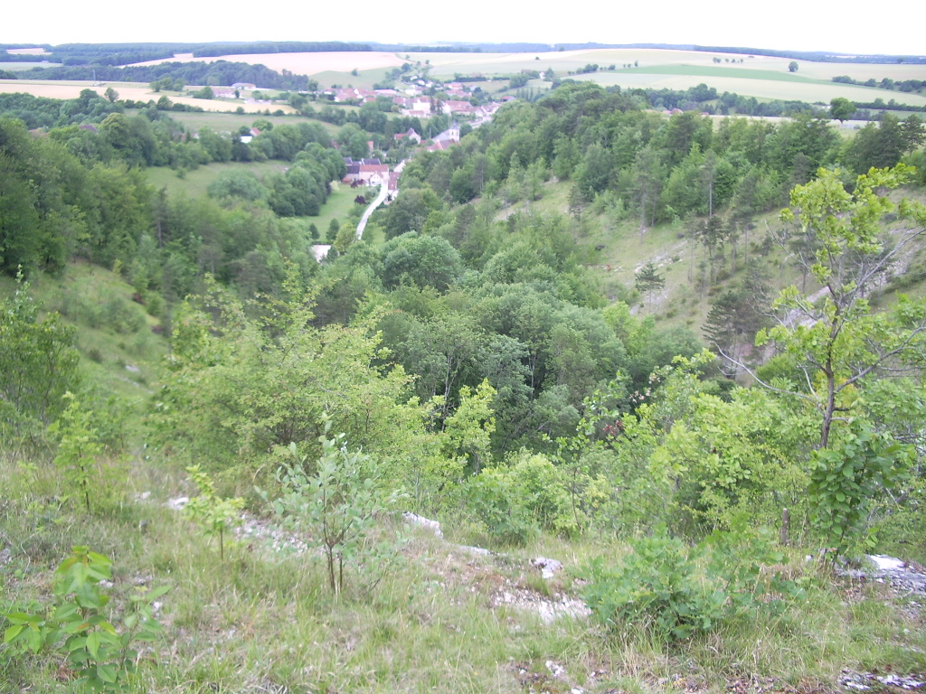 Etalante vu du cirque de la coquille